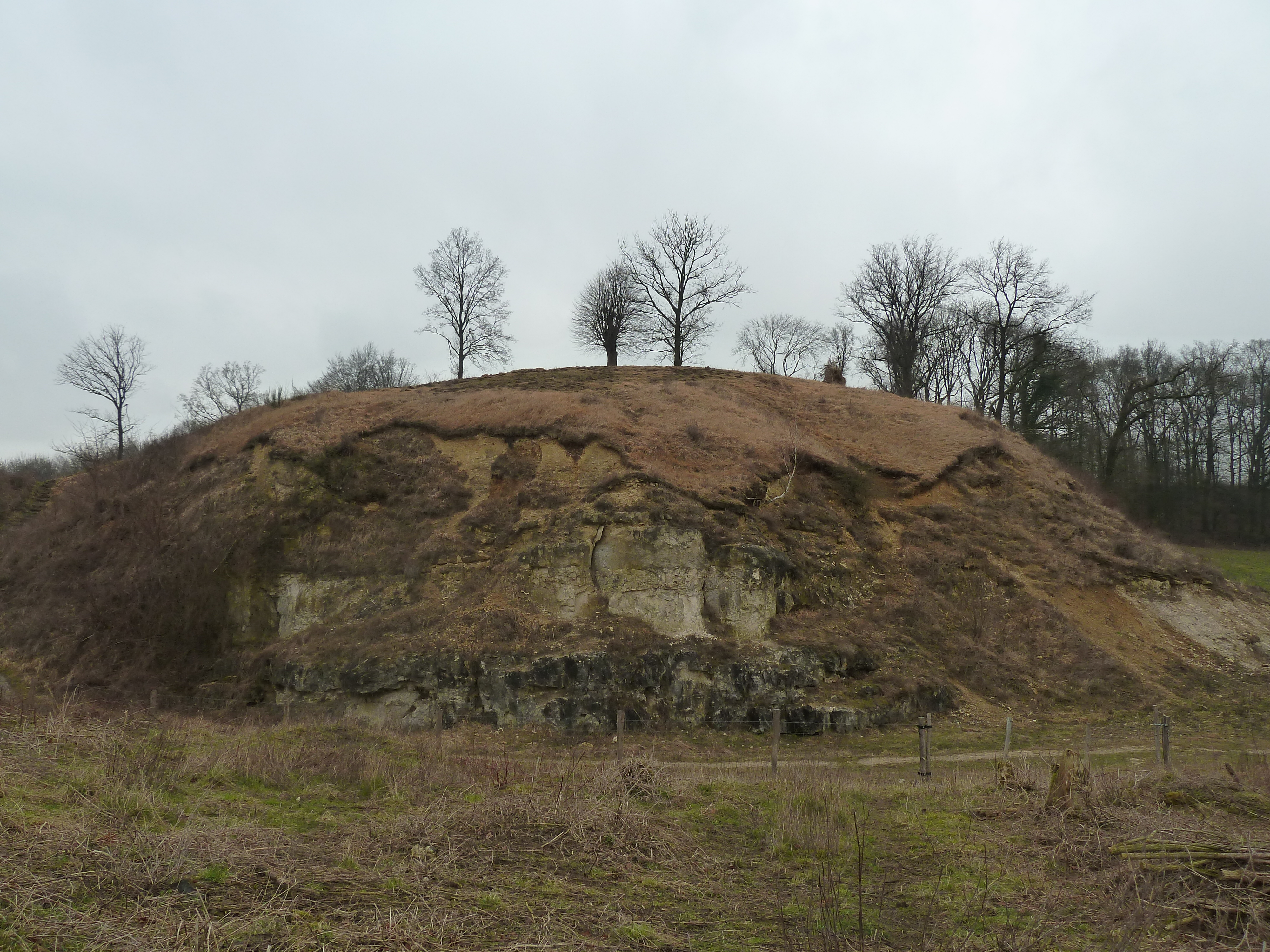 Groeve Blankenberg, Cadier en Keer, Nederland